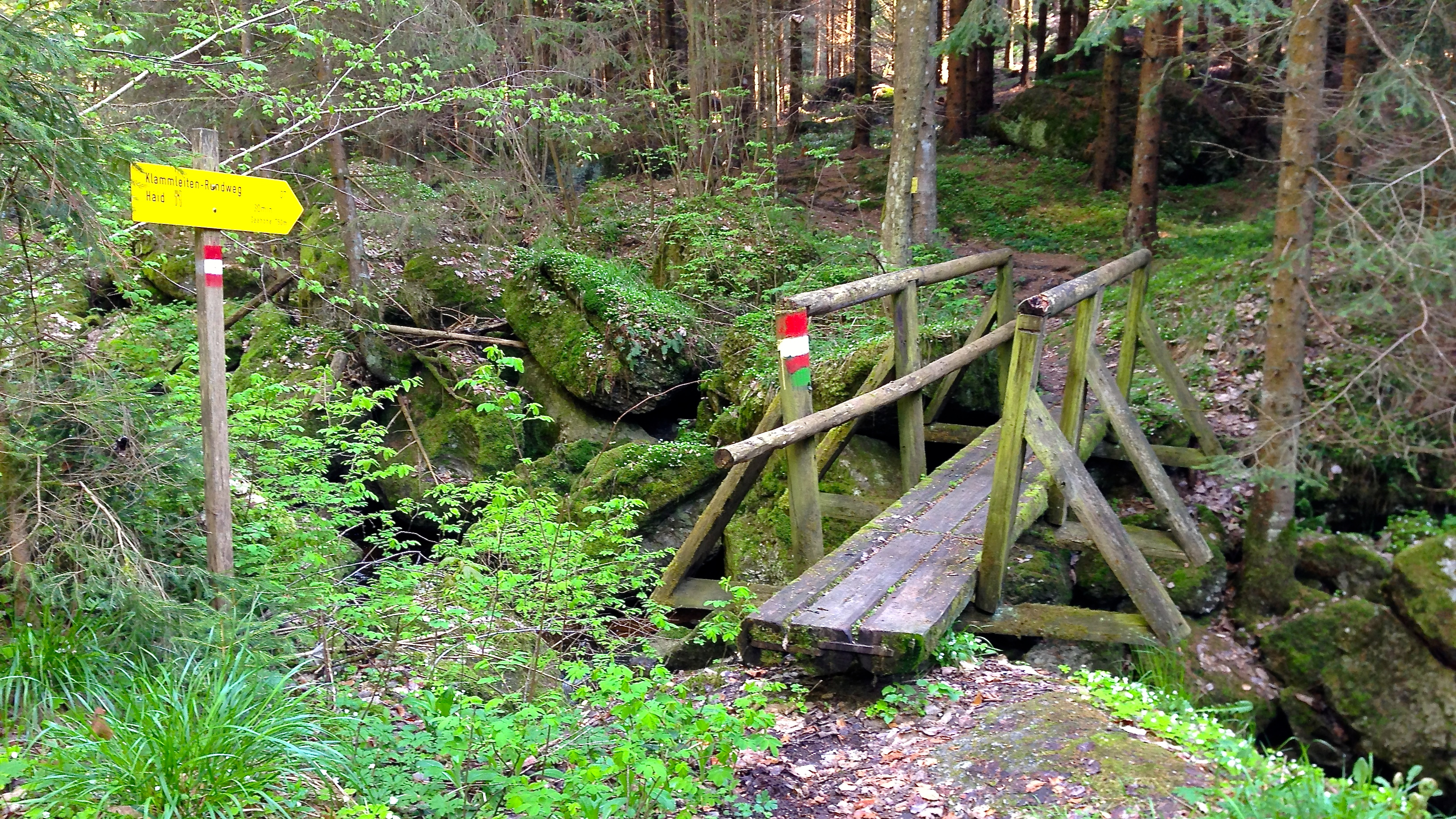 Brücke über den Klammleitenbach bei der Reindlmühle im FFH-Gebiet Waldaist-Naarn in Königswiesen im Bezirk Freistadt in Oberösterreich